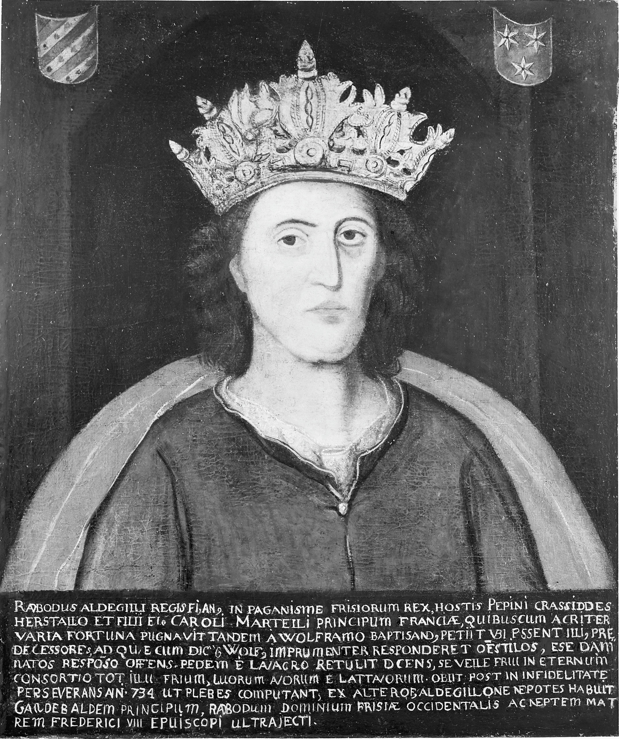 Kasteel Radboud: portret van Radbout na de restauratie